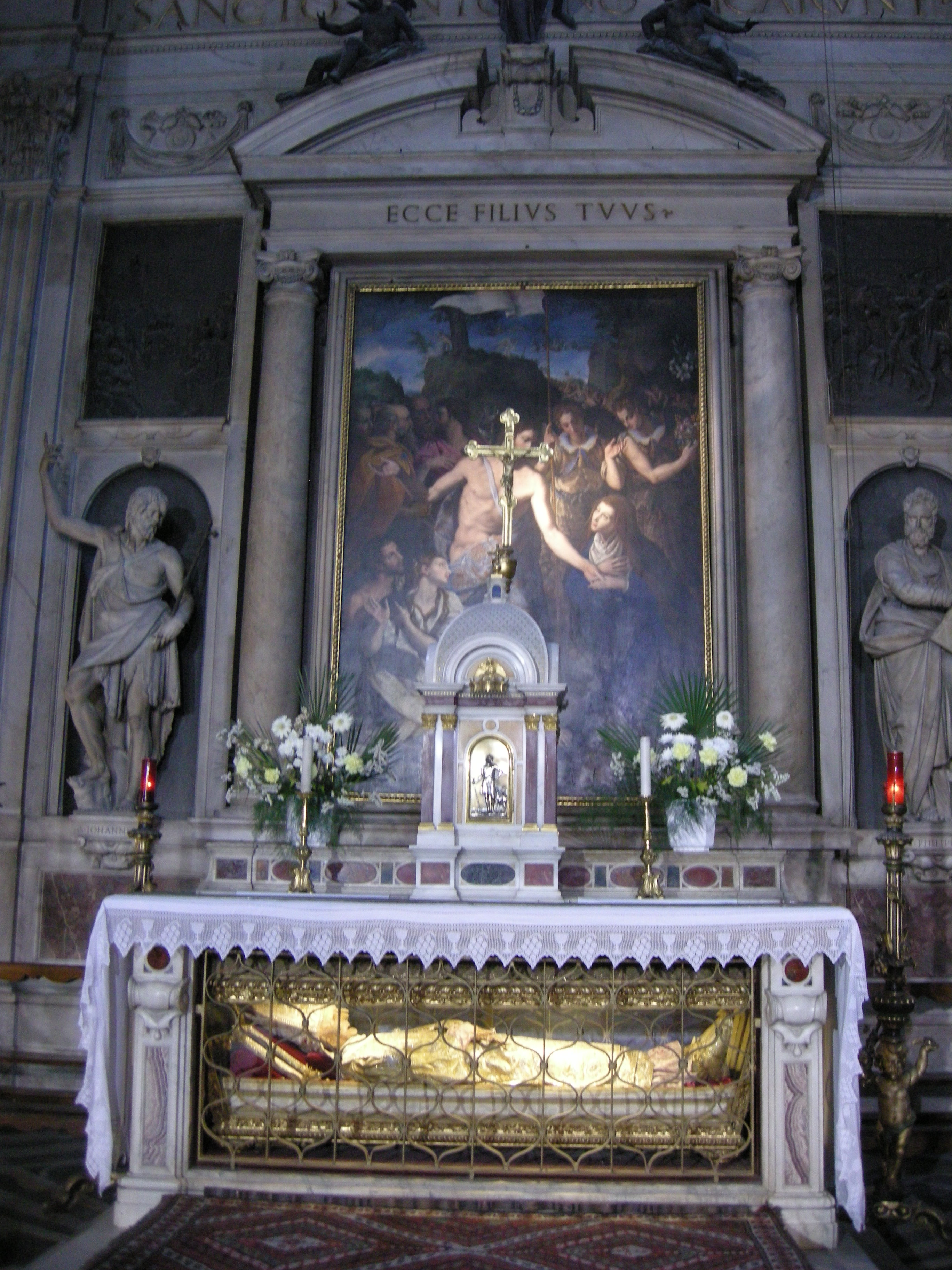 San marco, firenze, cappella salviati, altare